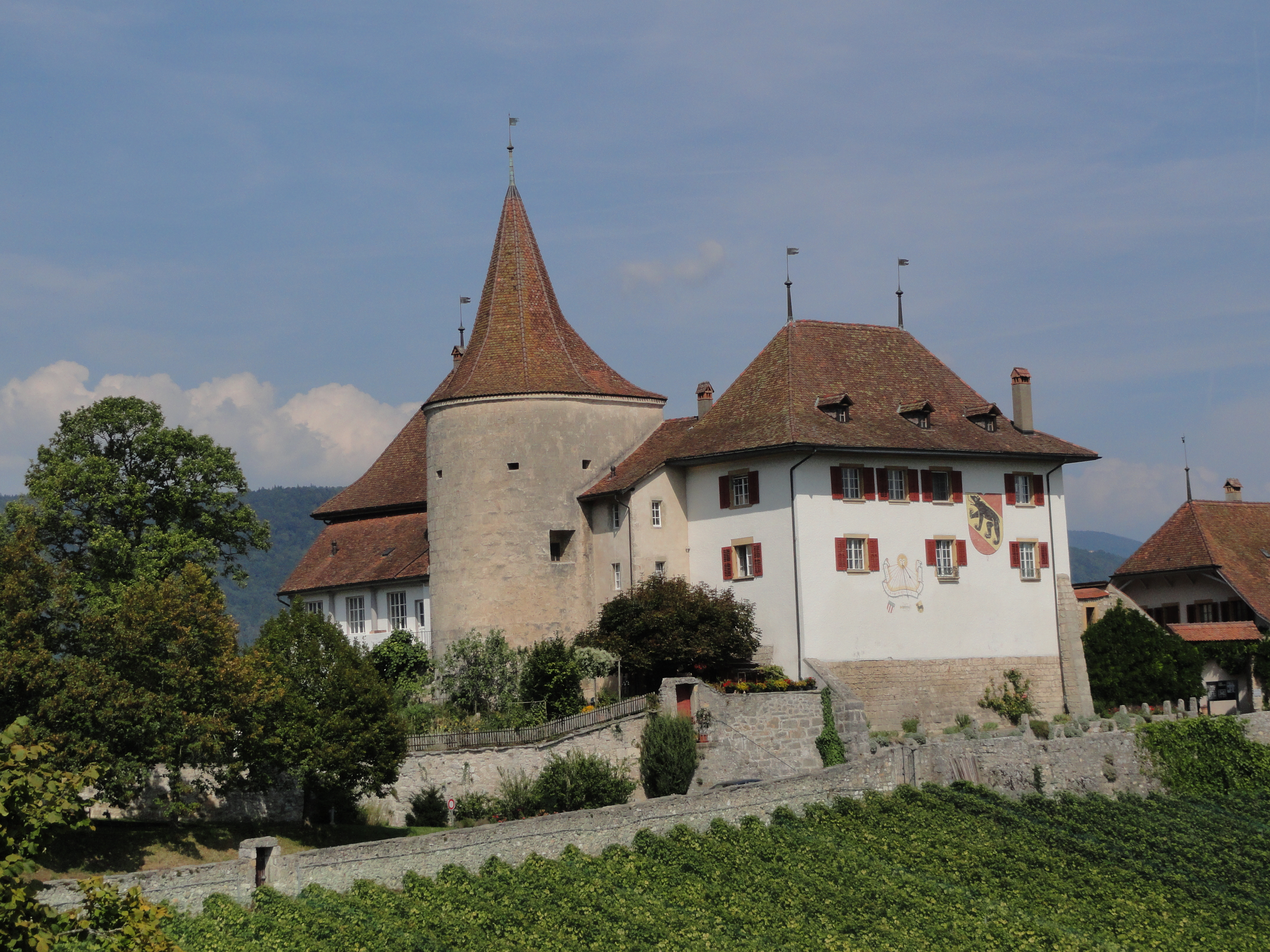 Le châteu de Cerlier (Erlach), vu du sud